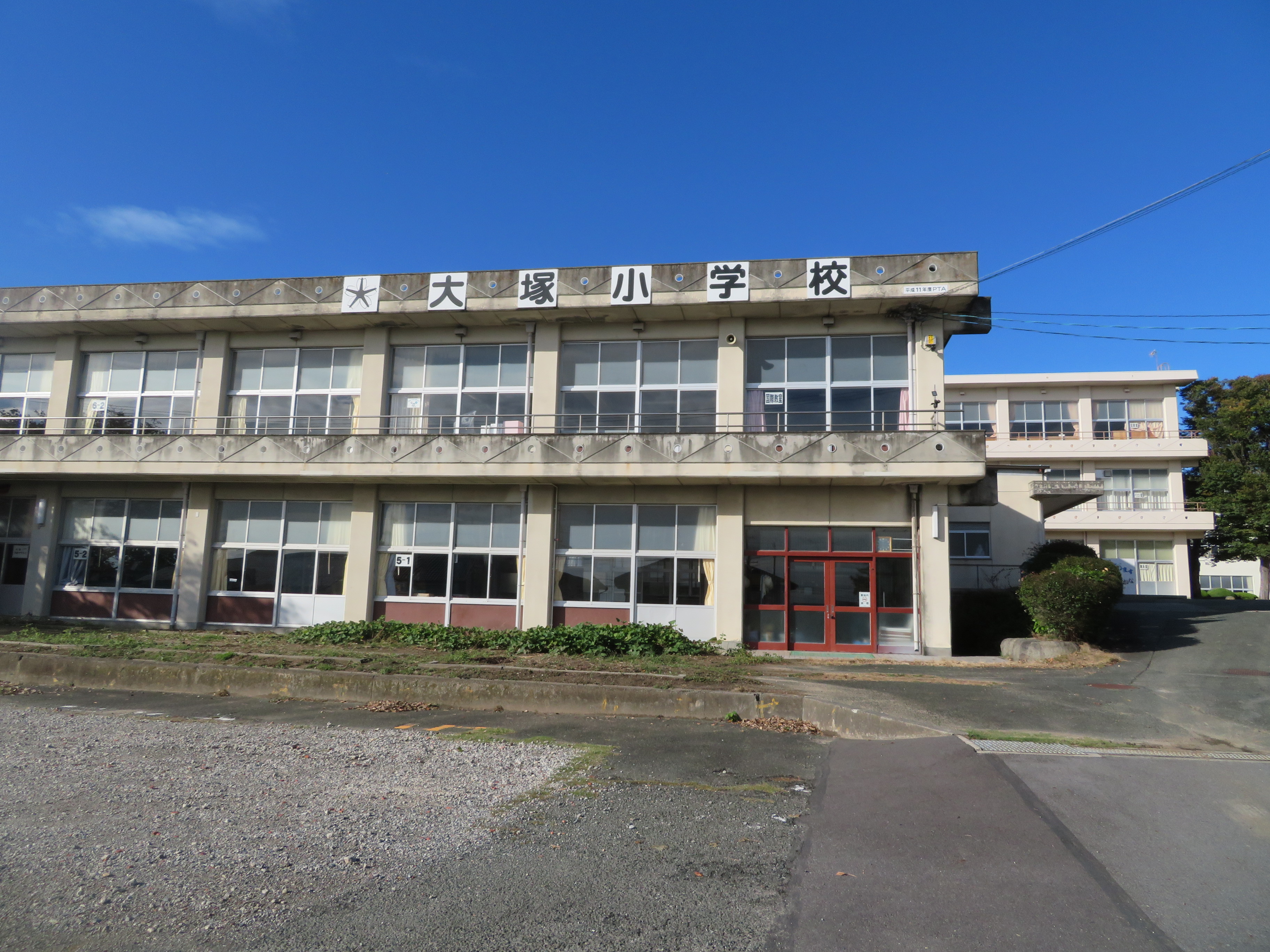 蒲郡市立大塚小学校。愛知県蒲郡市大塚町